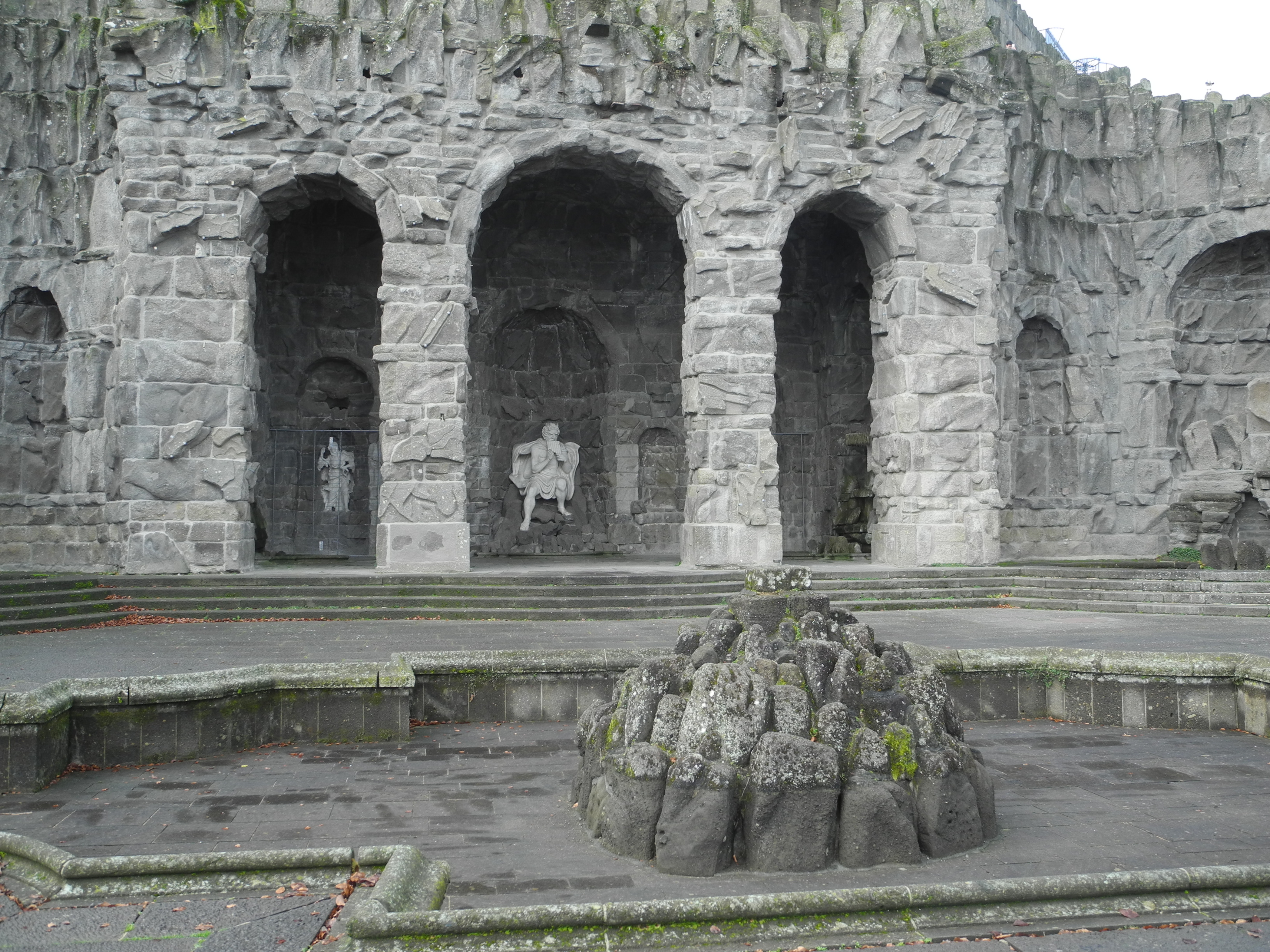 Die Vexierwassergrotte des Herkules im Bergpark Wilhelmshöhe in Kassel, Hessen, Deutschland. Artischockenbassin.